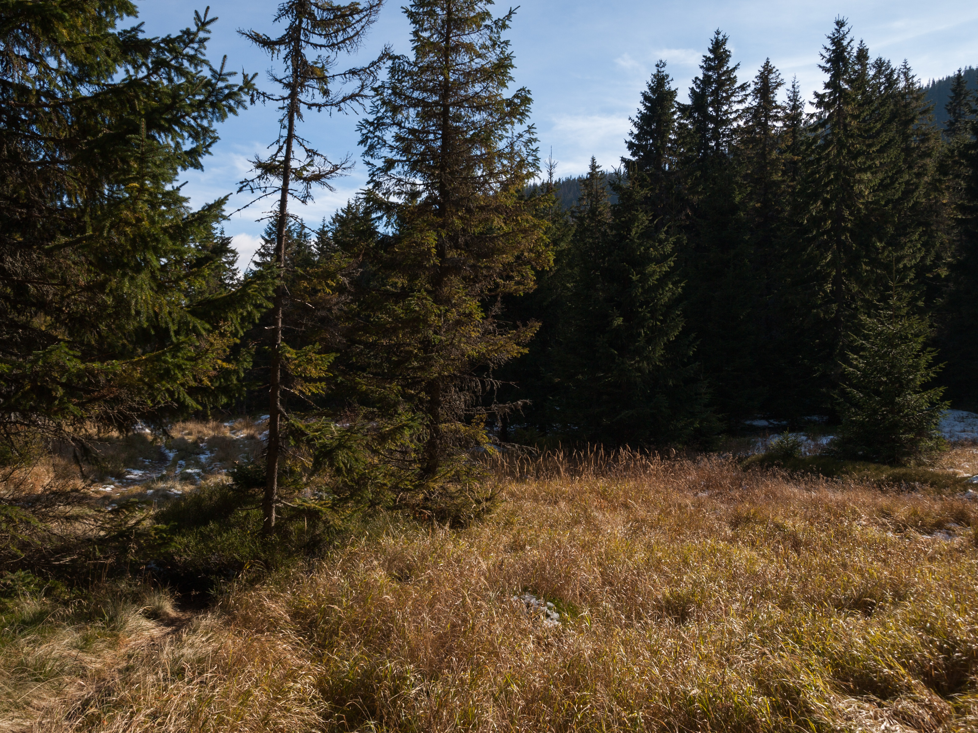 Rakuska PolanaSlovenčina: Vyšná Folvarská poľana